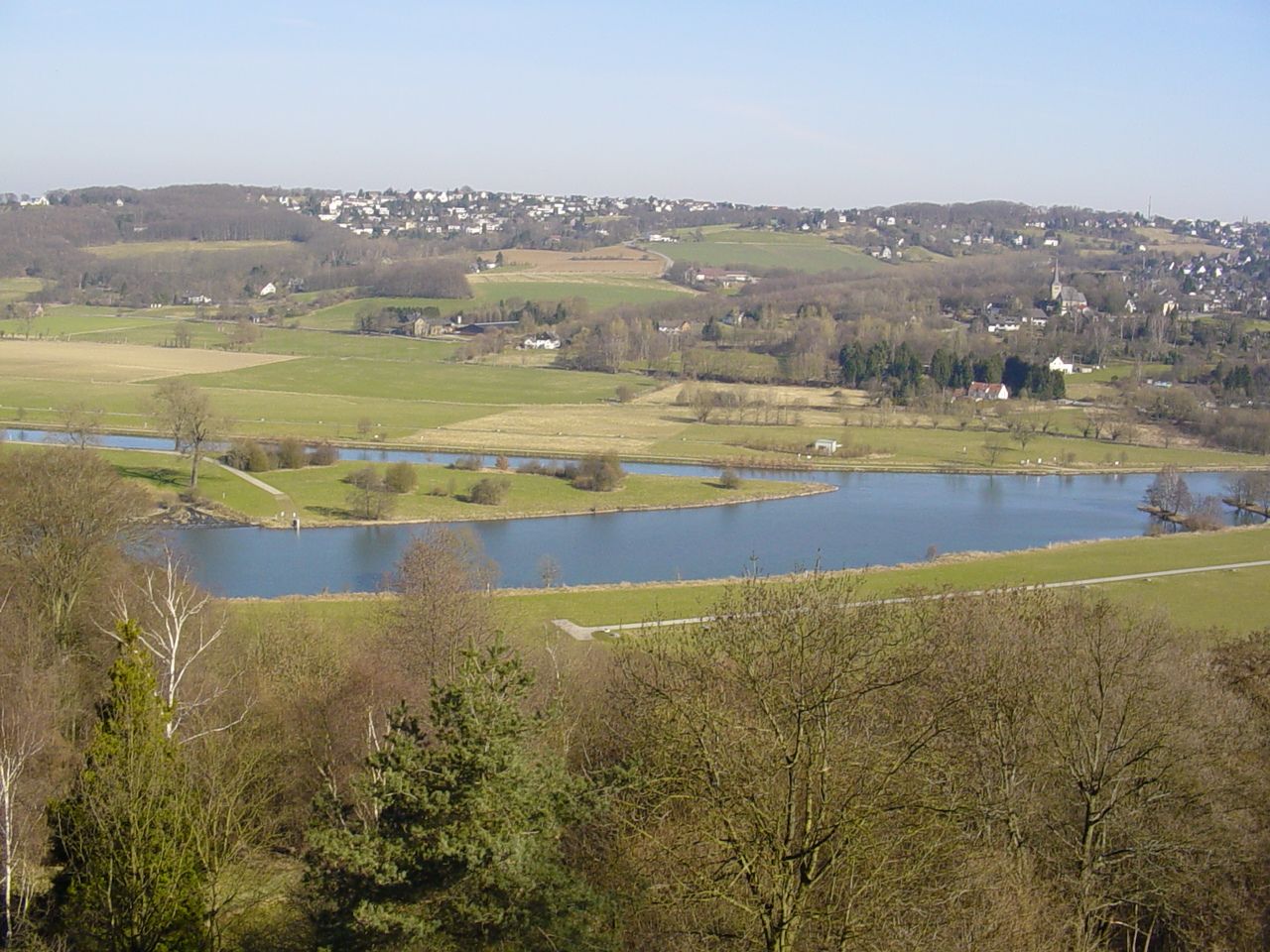 Blick von der Burg Blankenstein über das Ruhrtal nach Stiepel